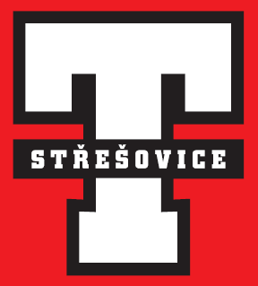 Logo FO Tatran Stresovice